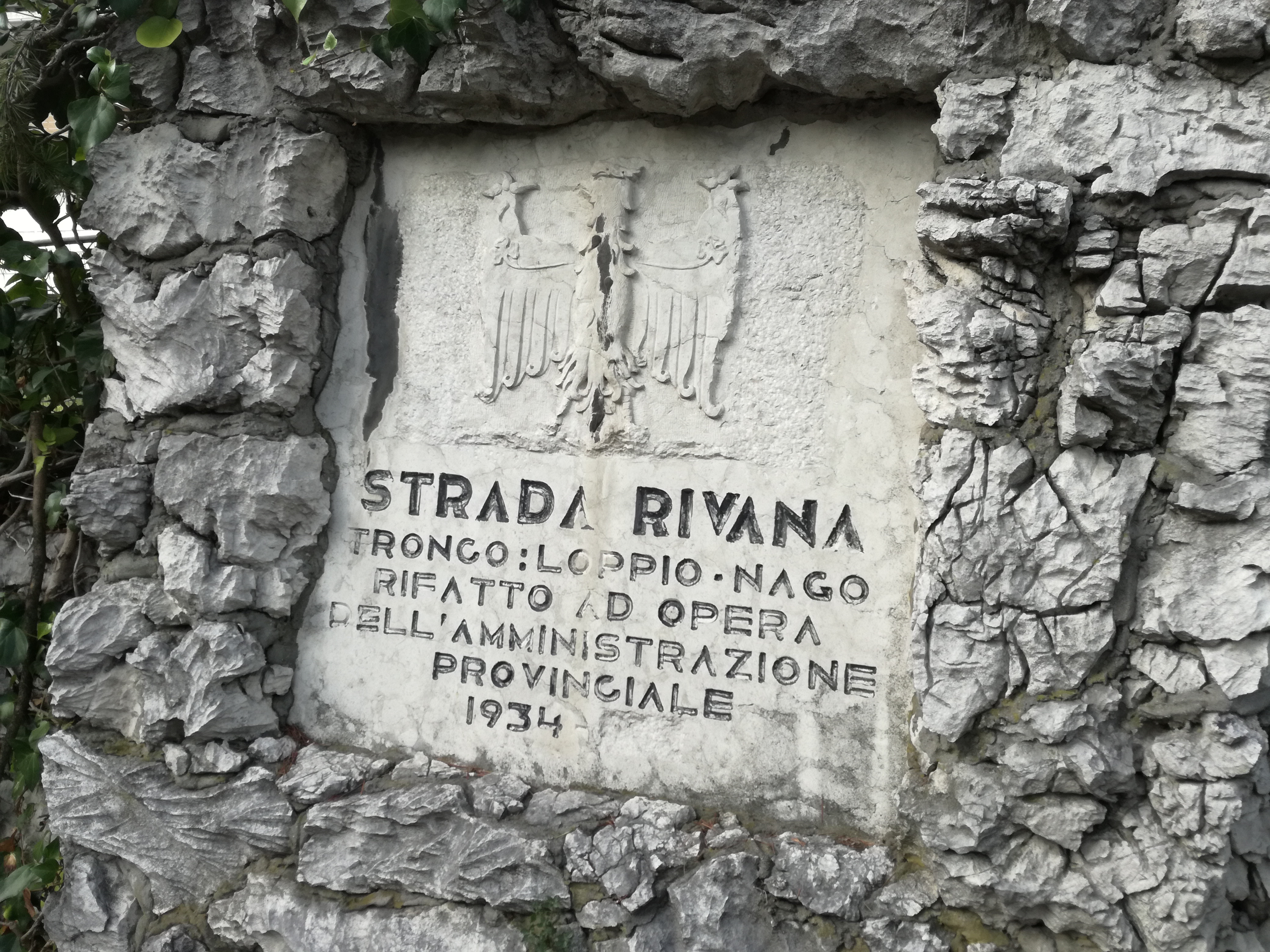 Passo San Giovanni - Gedenktafel an die Erneuerung der Straßenabschnittes Loppio - Nago 1934